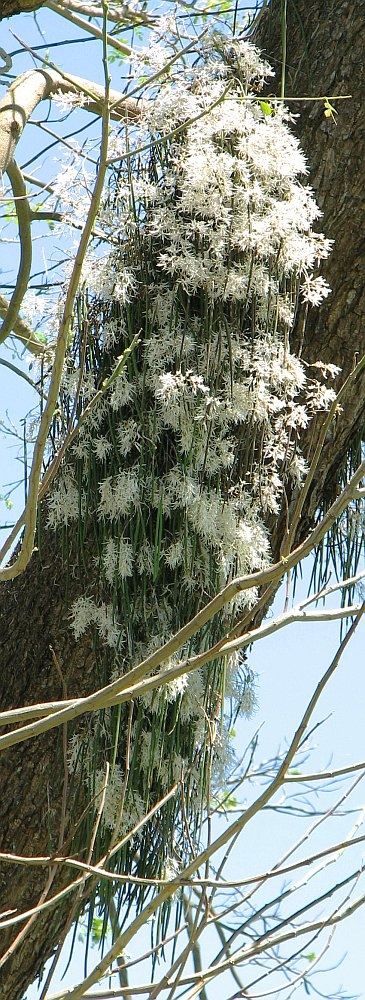 Dockrillia teretifolia (Pencil Orchid)